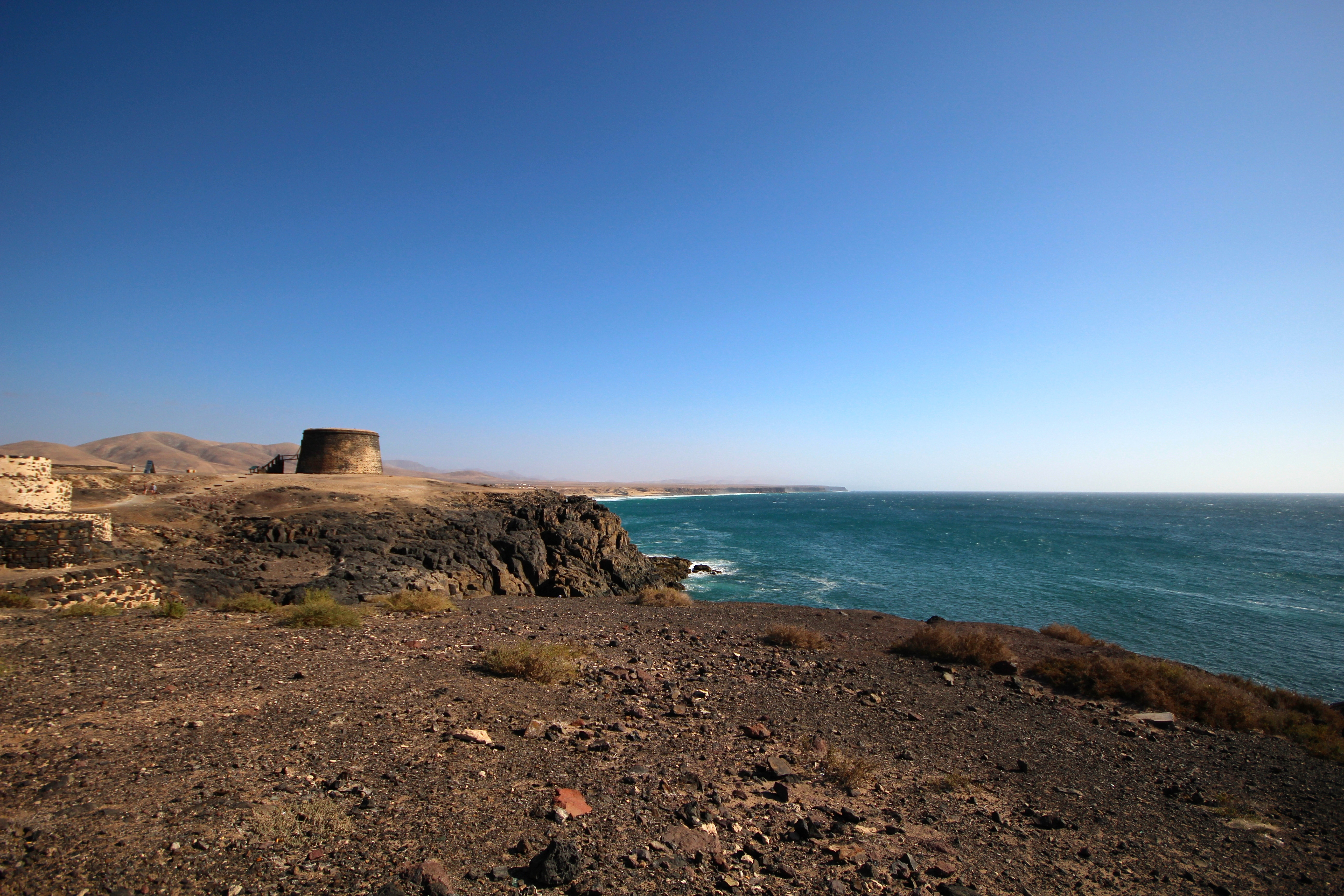 Castillo de El Cotillo, La Oliva, Fuerteventura.